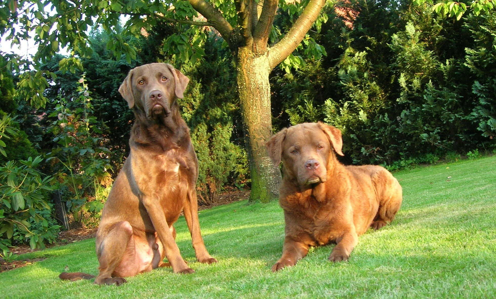 Quintus vom Schwarzbachtal und Captain Sailer Brown Beaver Foto: Ralf Becker 12.07.2007